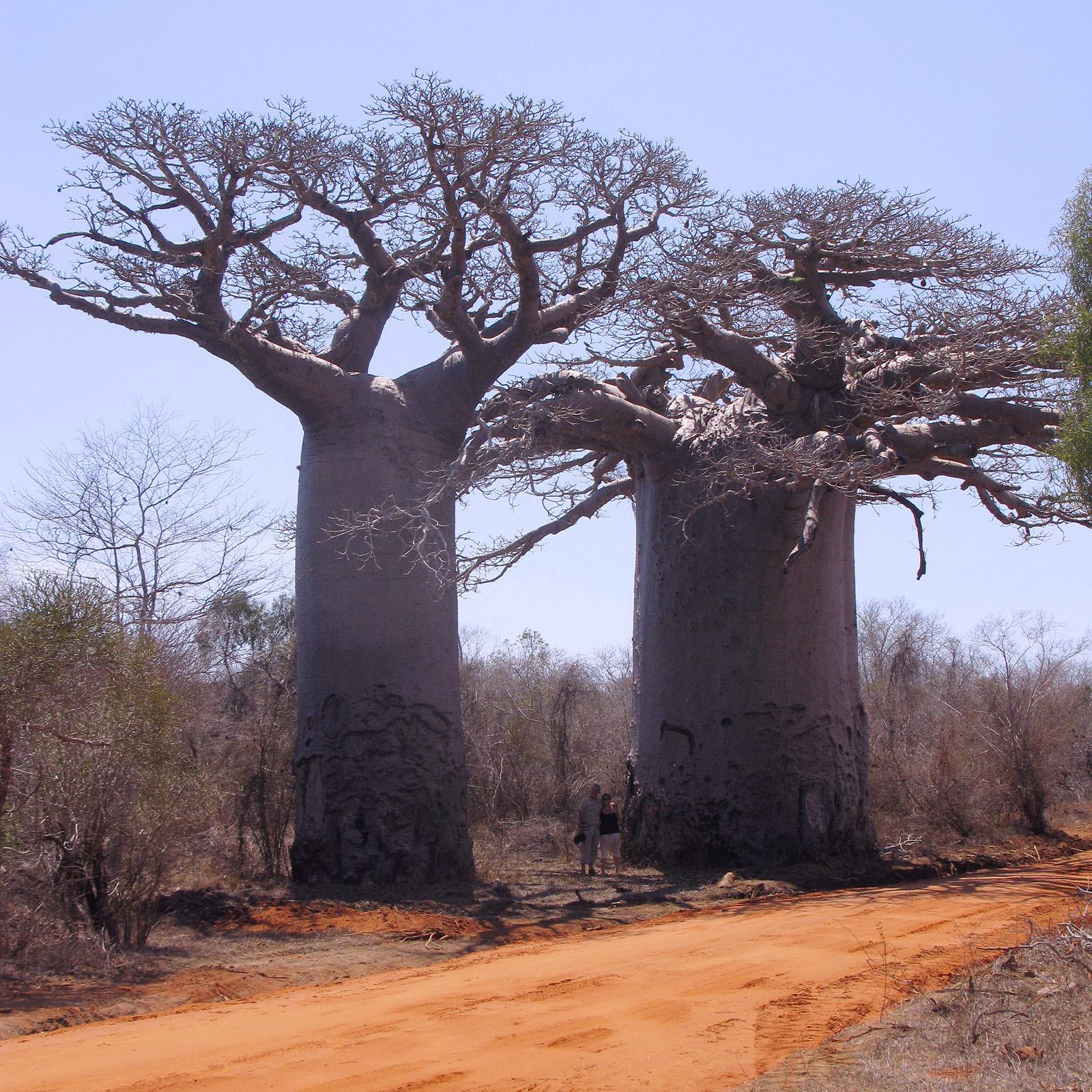 Baobab (Adansonia) du Sud-Ouest de Madagascar